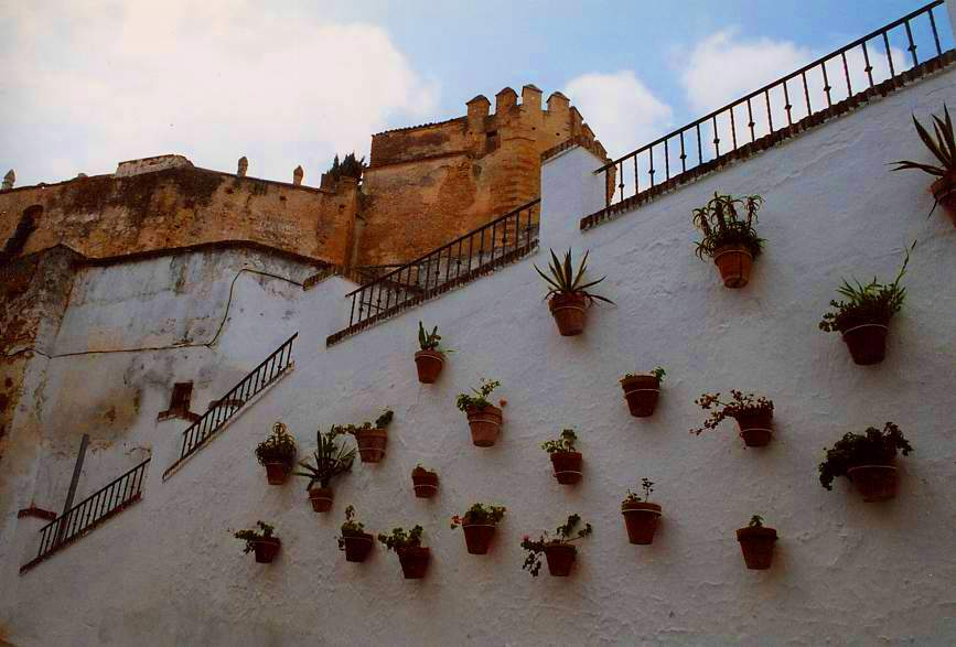 Castillo de Arcos de la Frontera